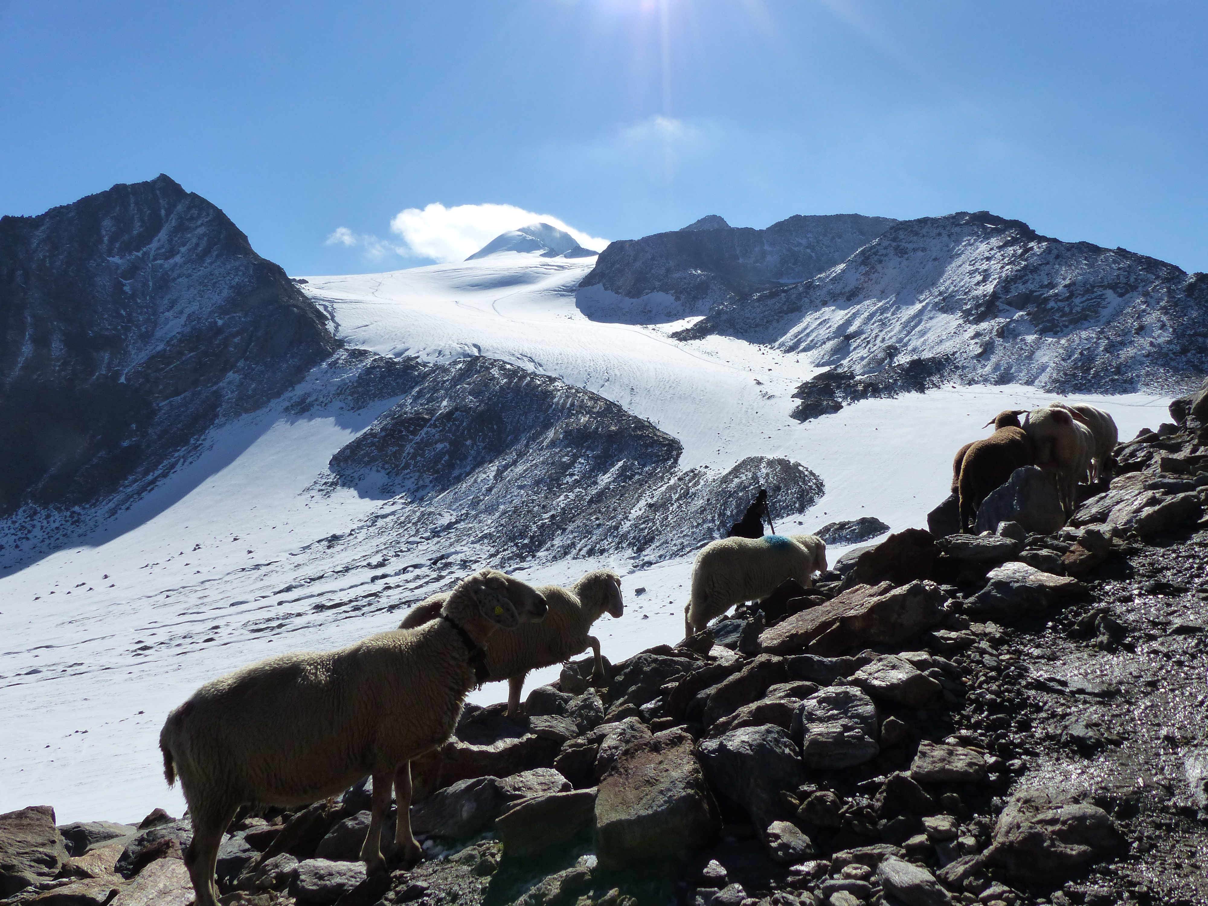 Schaftrieb ins Schnalstal kurz unterhalb des Niederjochs mit Niederjochferner und Similaun im Hintergrund